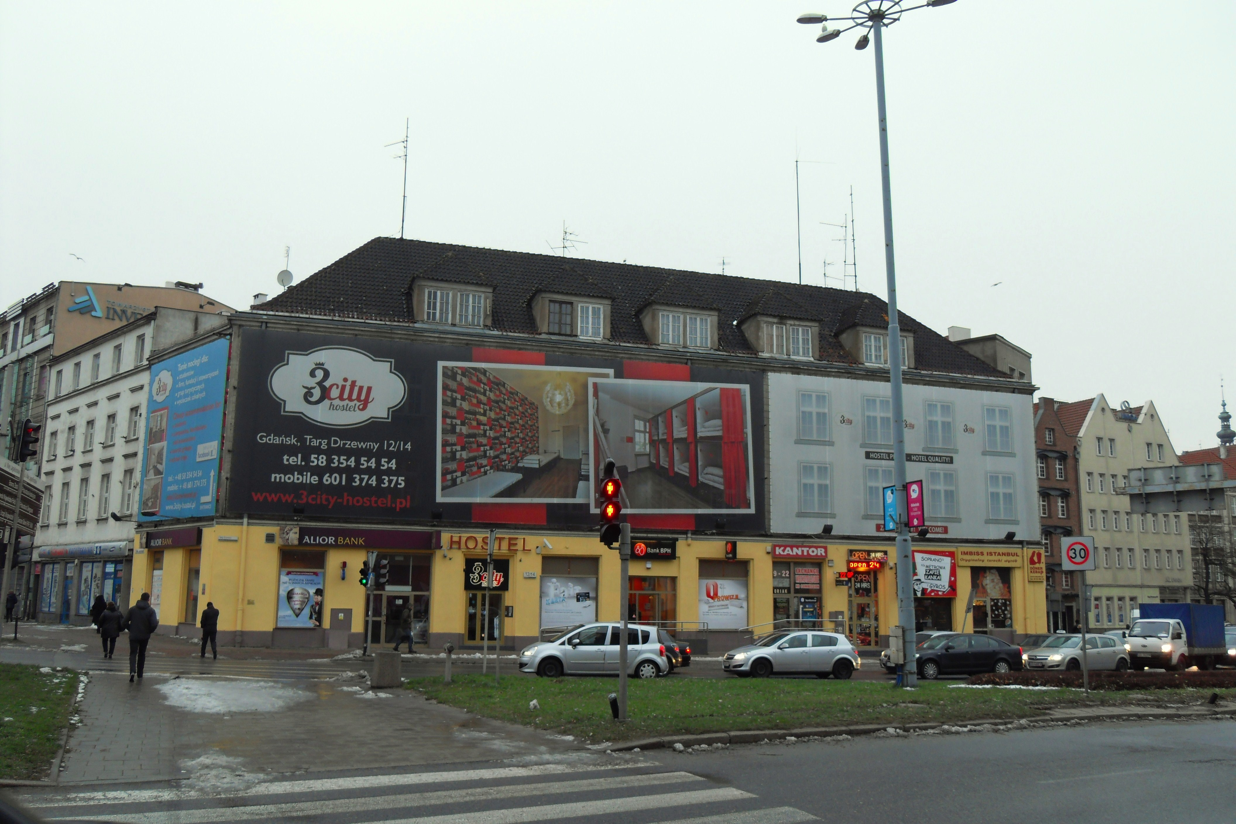 Gdańsk Śródmieście, Targ Drzewny 12/14.